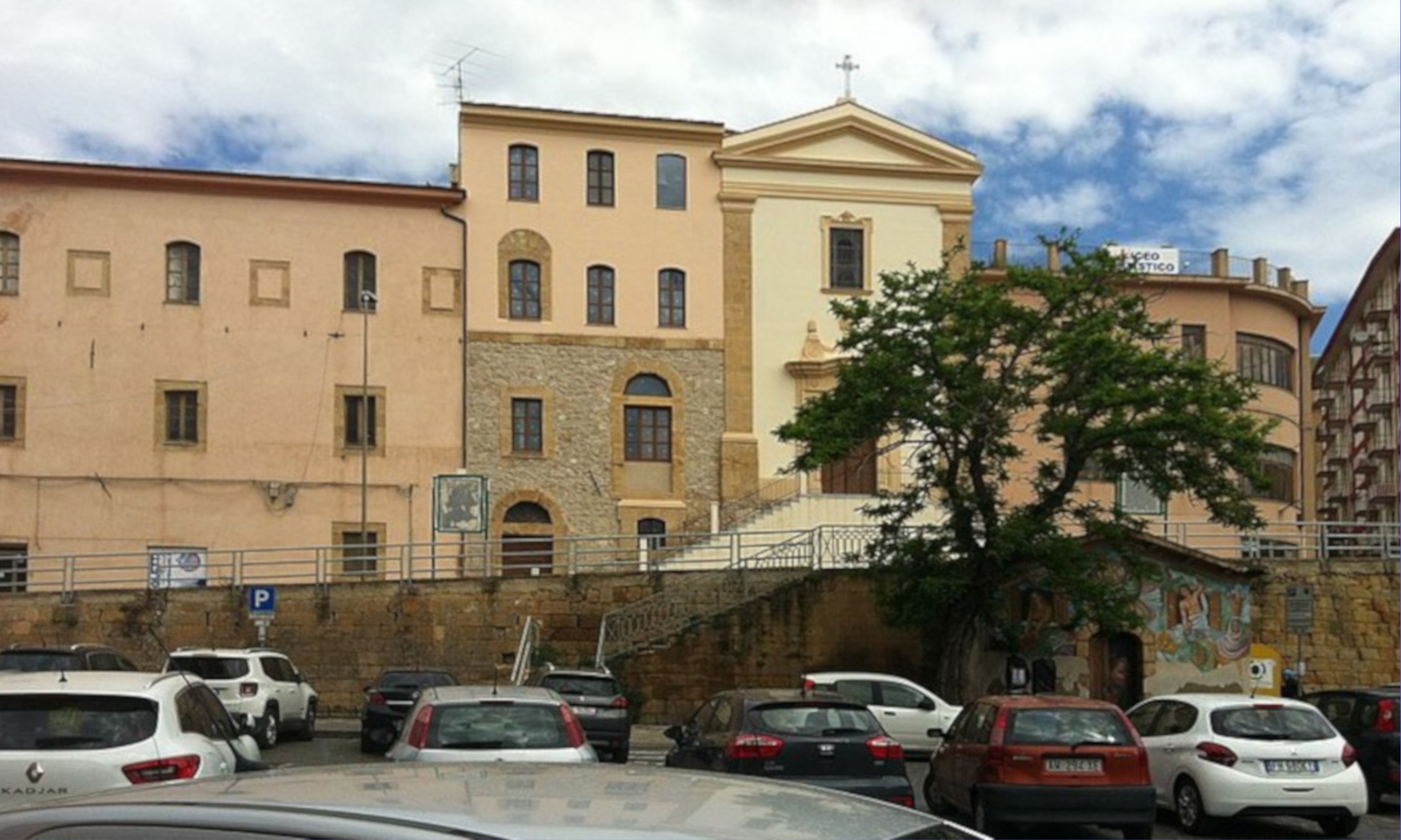 Caltanissetta - Centro storico: chiesa della Madonna della Grazia, vista dal parcheggio